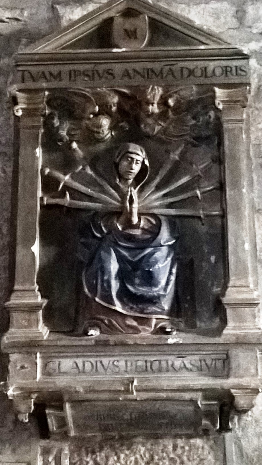 Preĝejo Sankta Nikolao en Beaune : dipatrino de sep doloroj